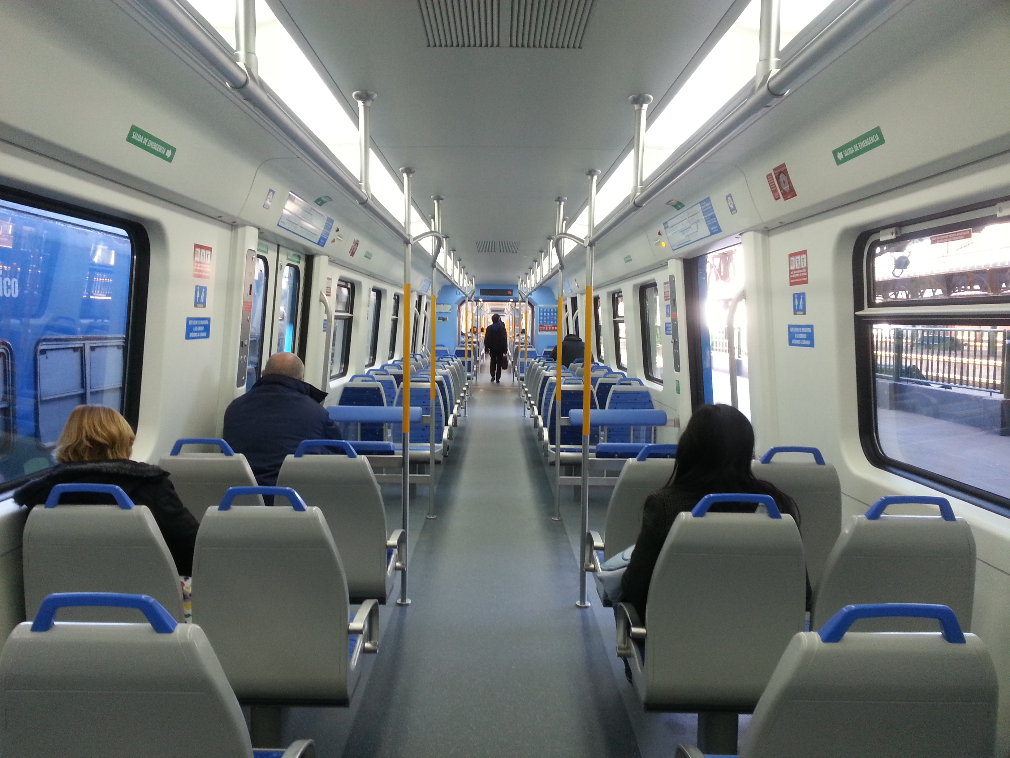 Interior de un coche eléctrico CSR de la línea Roca, junio de 2015.